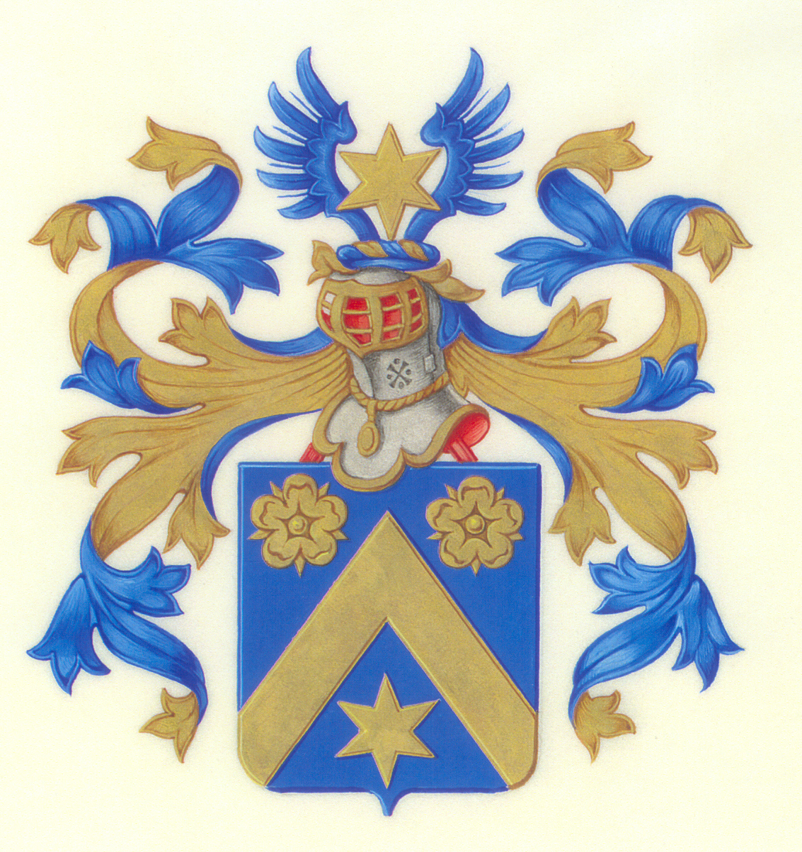 d'azur au chevron, accompagné en chef de deux roses et en pointe d'une étoile à six rais, le tout d'or